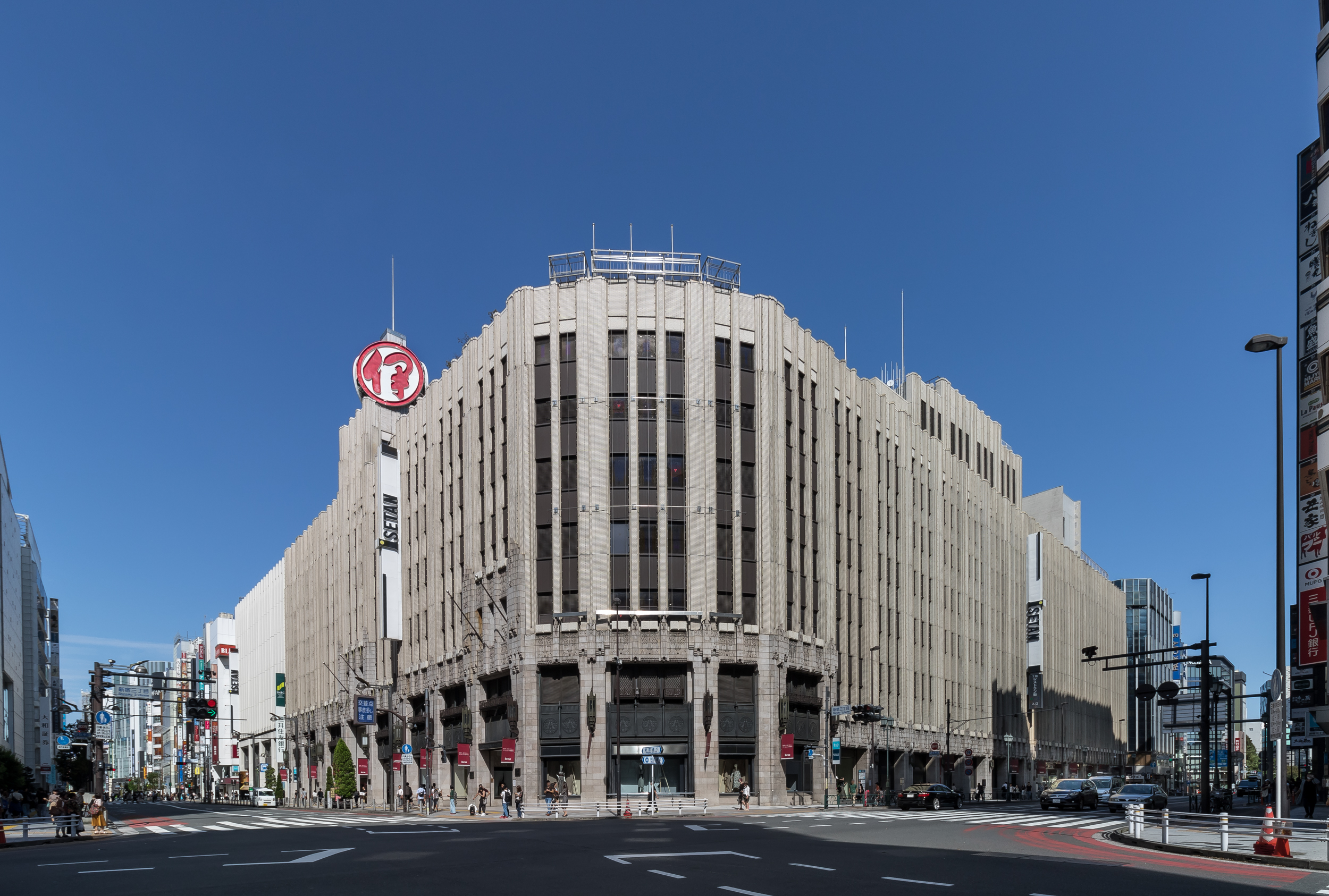 Isetan Shinjuku. 伊勢丹新宿本店(東京都歴史的建造物)